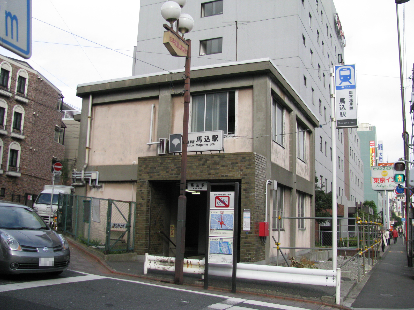 都営地下鉄浅草線馬込駅駅舎